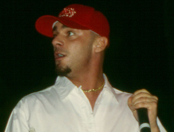 Söngvari Articolo 31, J Ax, á tónleikum.